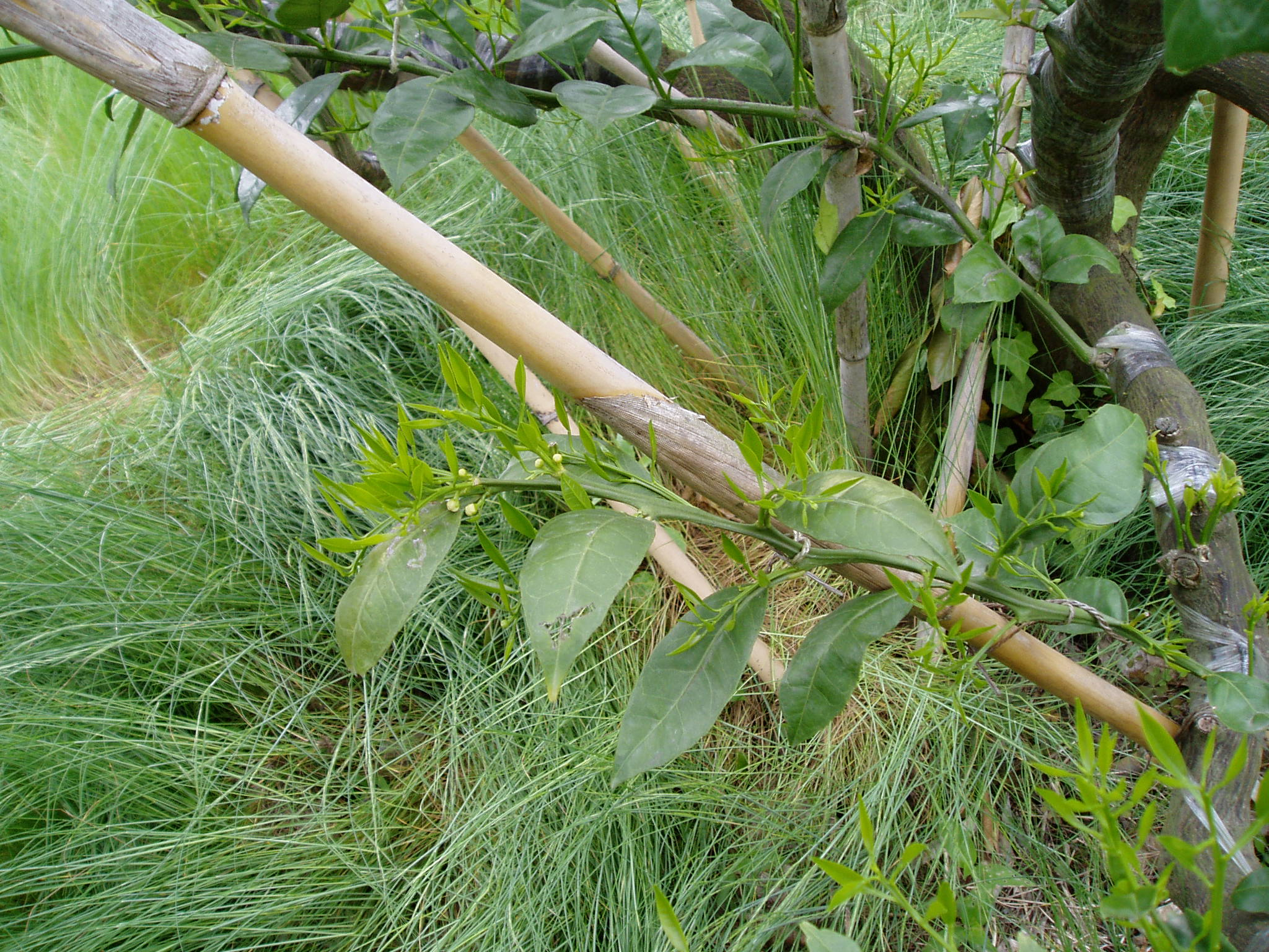 高接ぎ後の枝の伸び方